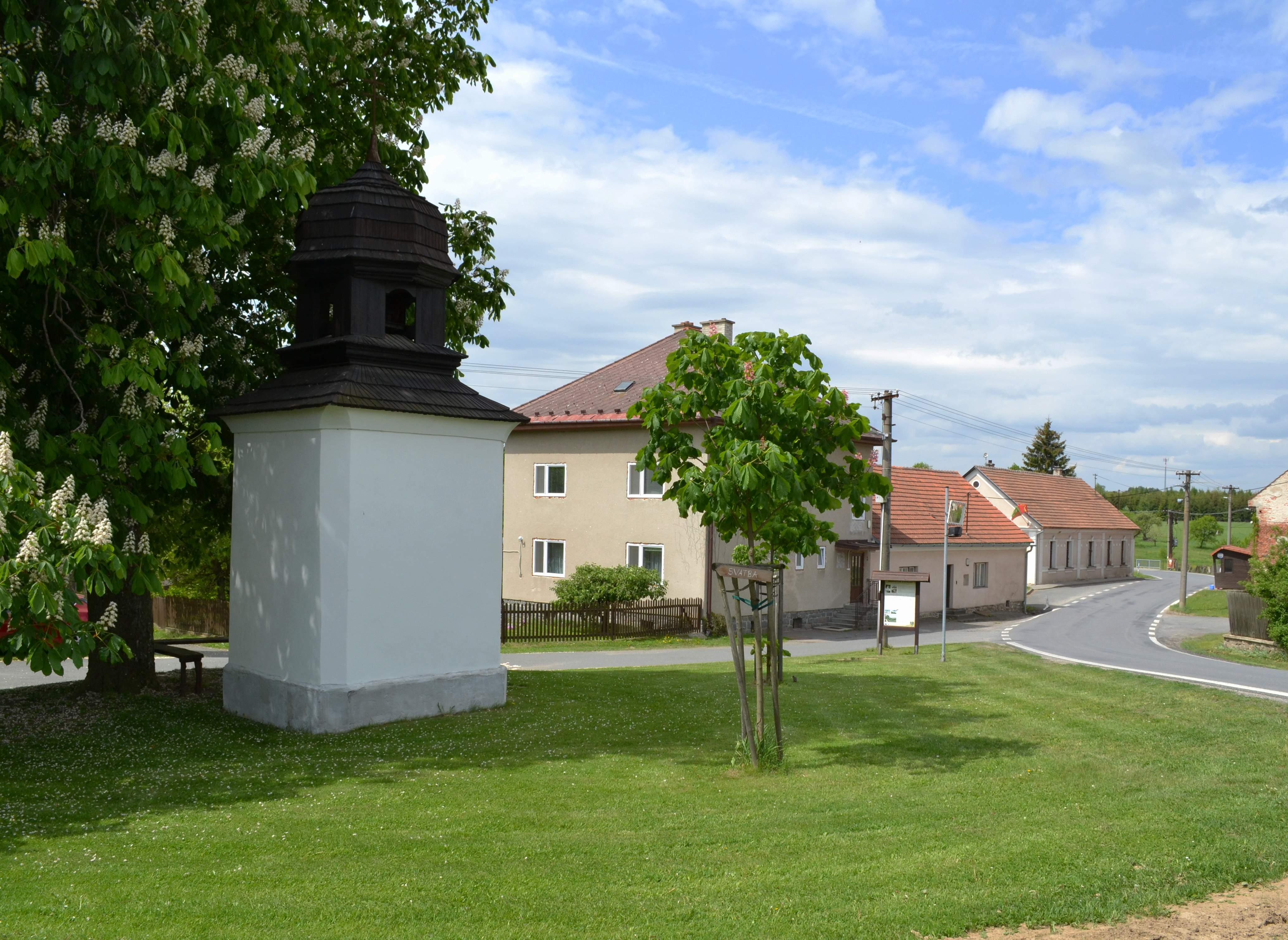 Horní Rožínka - náves